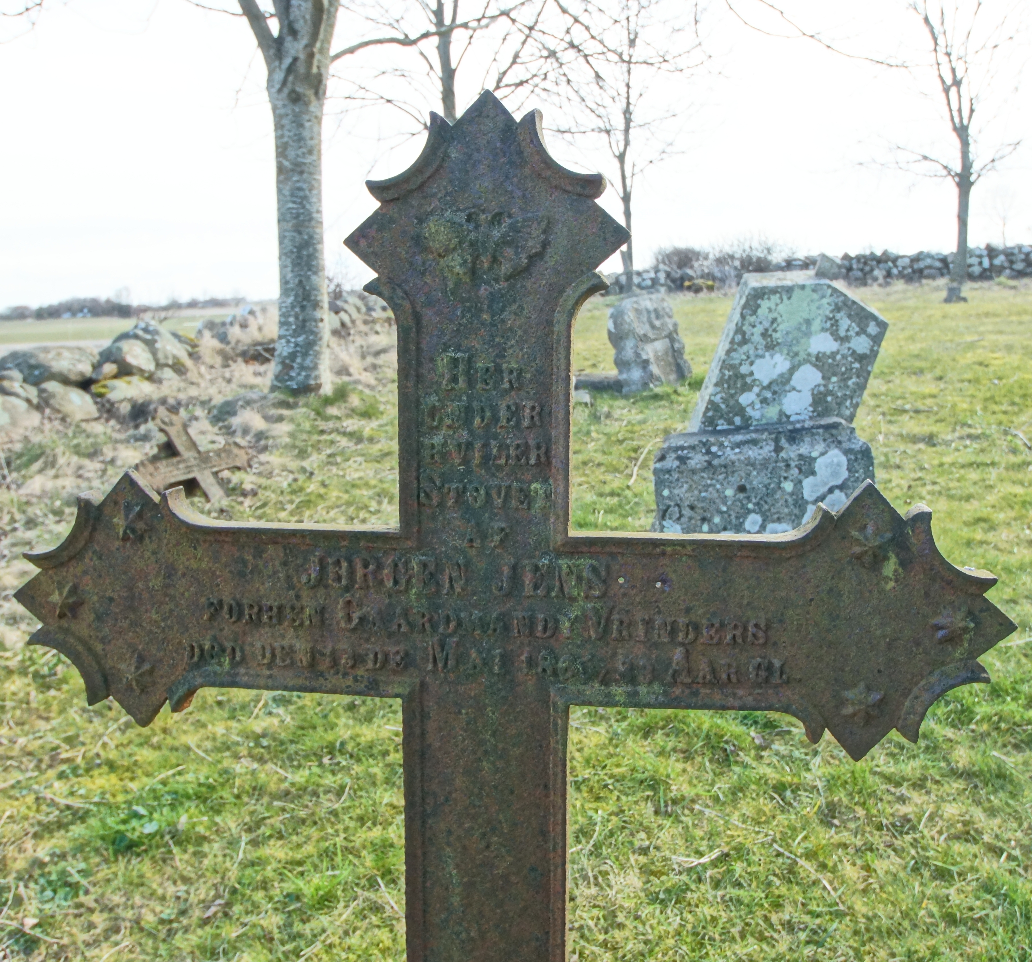 Rolsø Kapel, Gravsten 5